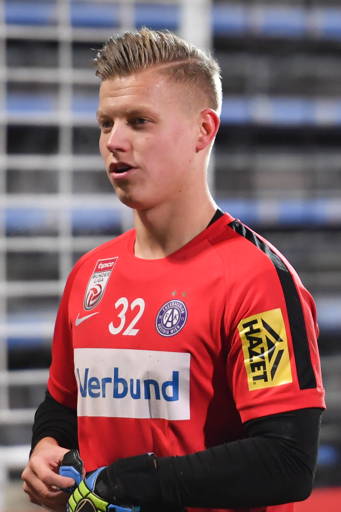 Fußball Bundesliga - FC Admira Wacker Mödling vs FK Austria Wien am 3. Dezember 2016. Bild zeigt Torhueter Patrick Pentz (AUS).